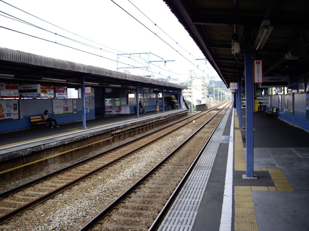 井土ヶ谷駅から横浜方向を望む